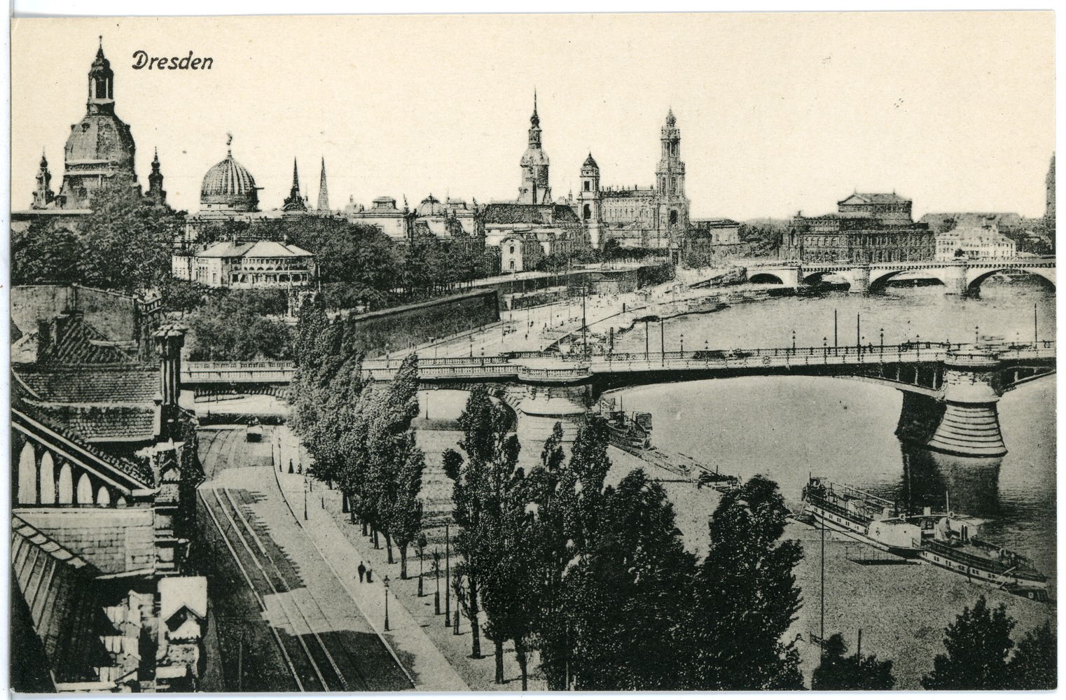 Dresden; Dresden This postcard is from publisher Brück & Sohn in Meißen ( This postcard has a unique number 18922 and is available in a higher resolution at the publisher. This images was uploaded in a cooperation project between Wikipedians and the publisher.